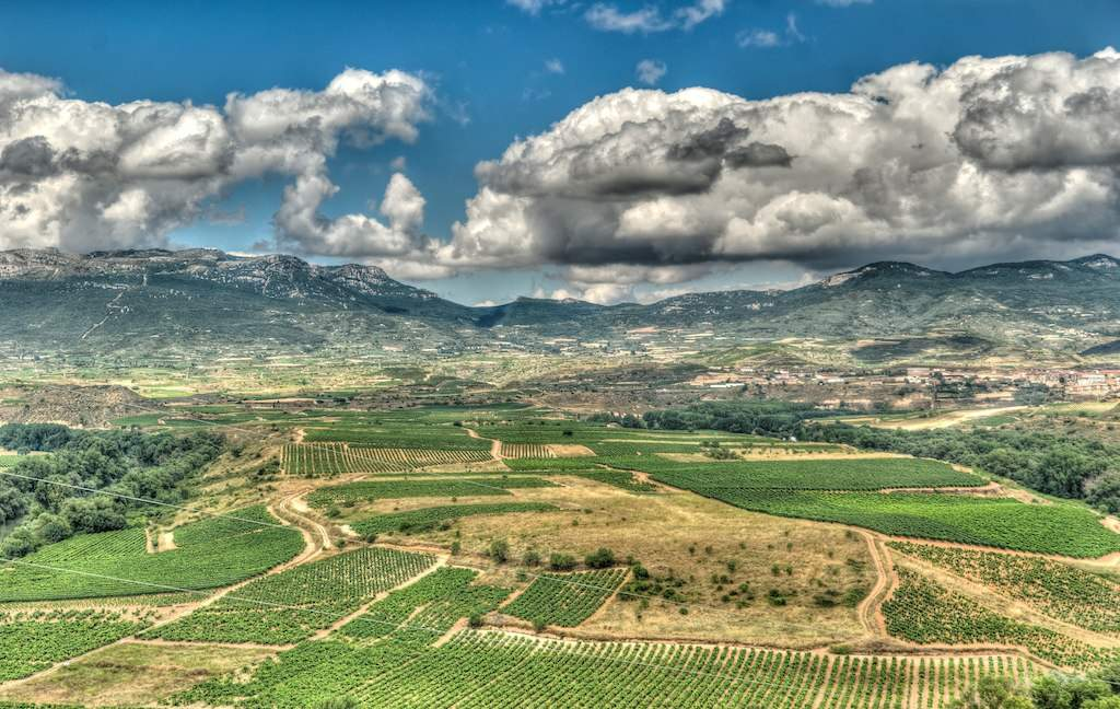 Vista de La Rioja desde Briones